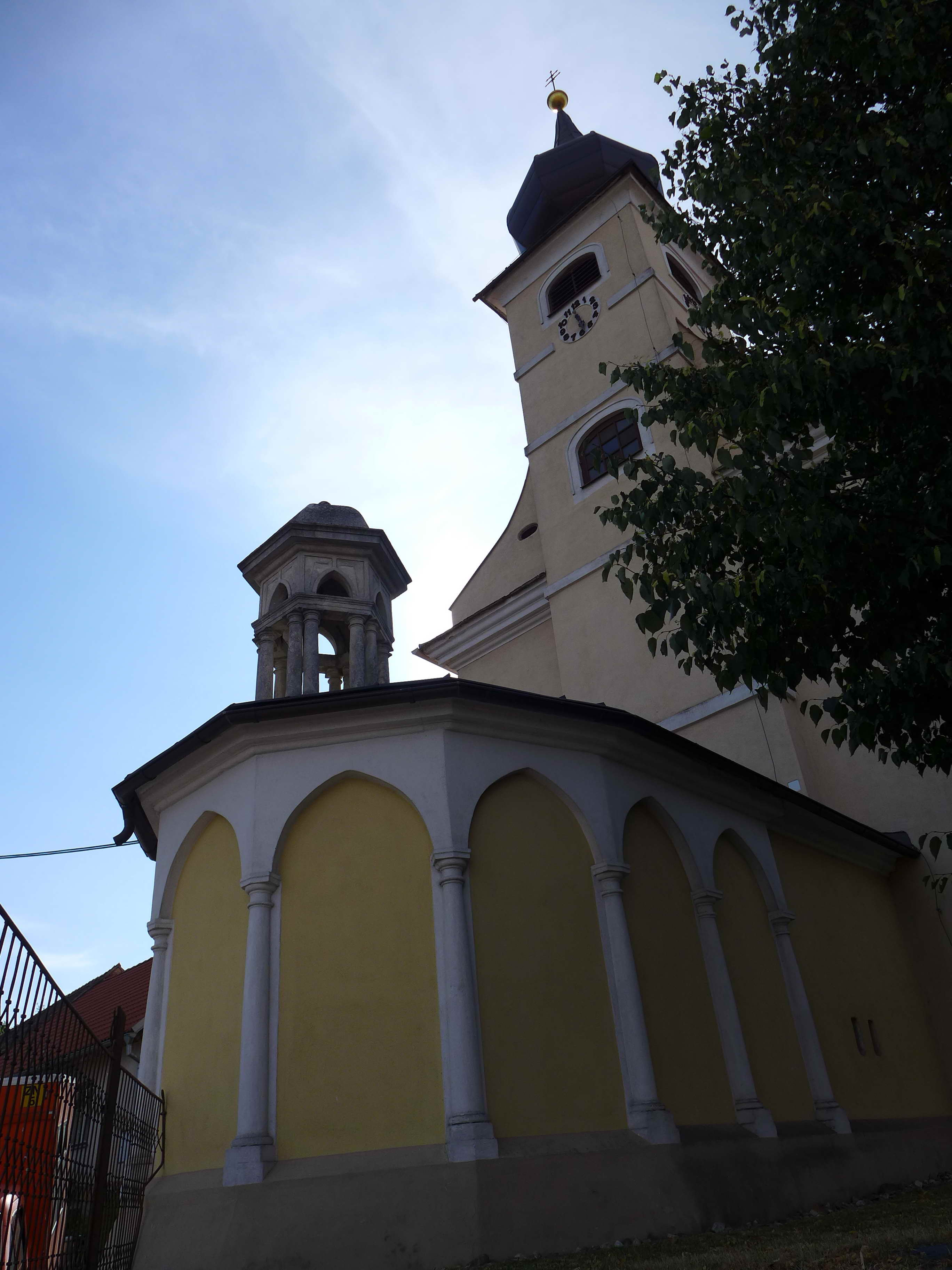 Kostel svatých Filipa a Jakuba, v obci, Pavlice.